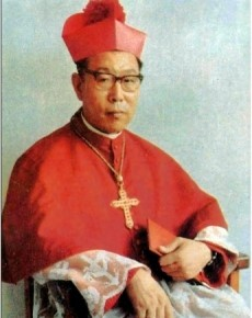 中文（台灣）: 天主教新竹教區杜寶晉主教